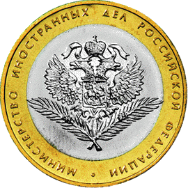 Юбилейная монета. 2002г. 10руб. Министерство иностранных дел Российской Федерации. Реверс.